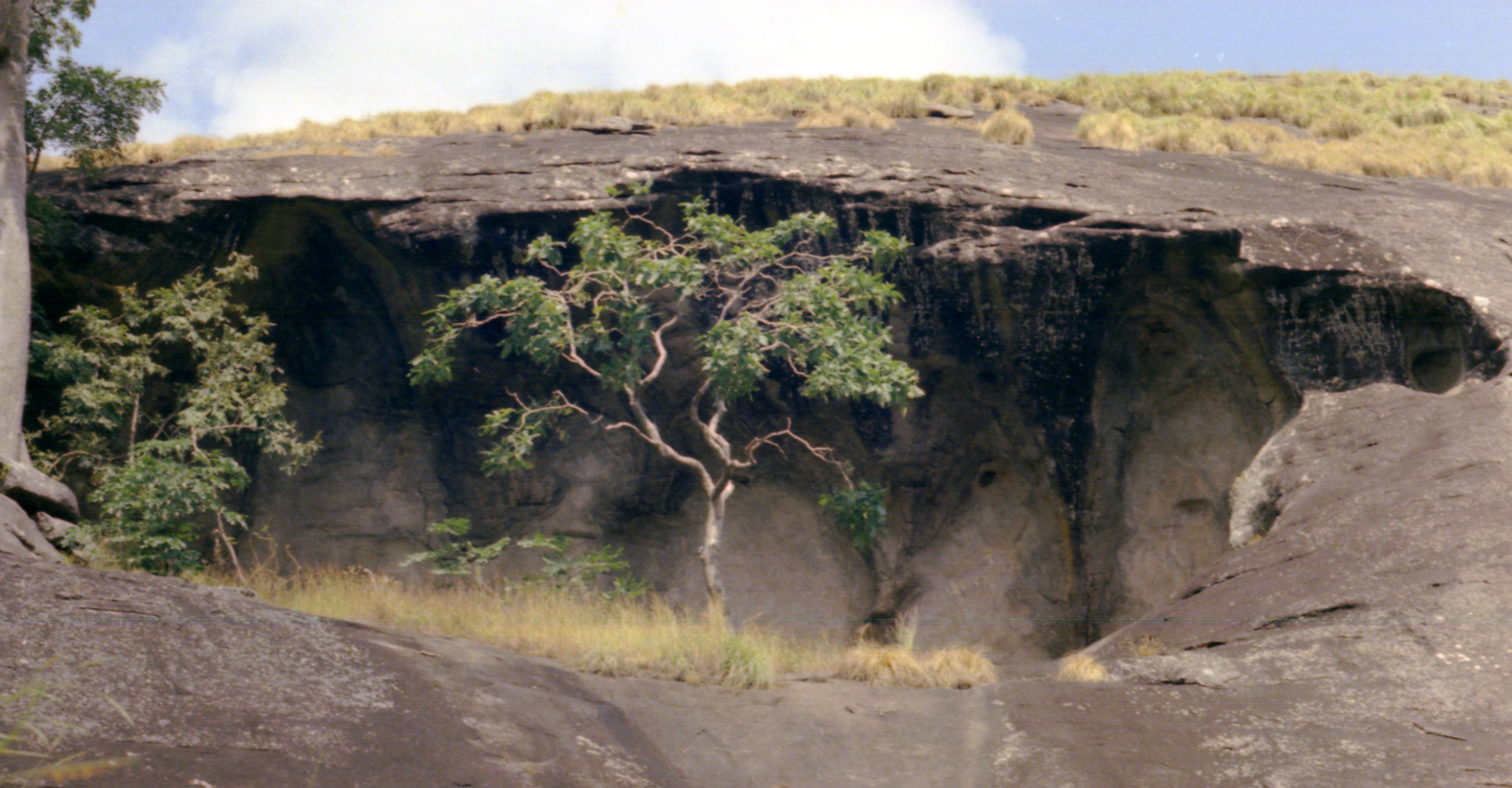 Kakoya Cave, Sierra Leone